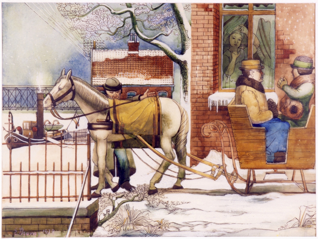 Titel: Es ist Winter. Mischtechnik auf Papier. Maße: 440 x 580 mm